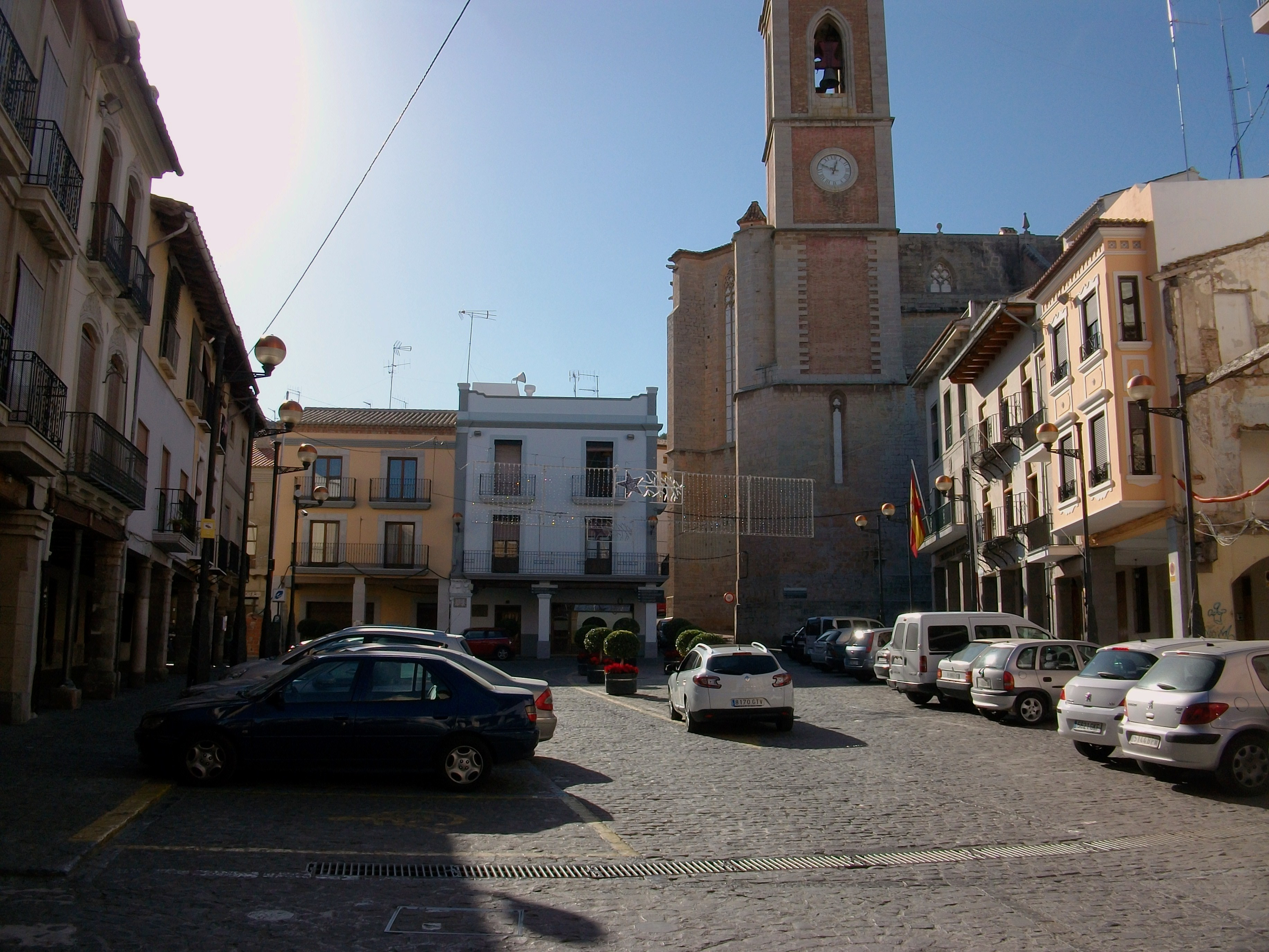 Plaça Major de Sagunt, País Valencià.